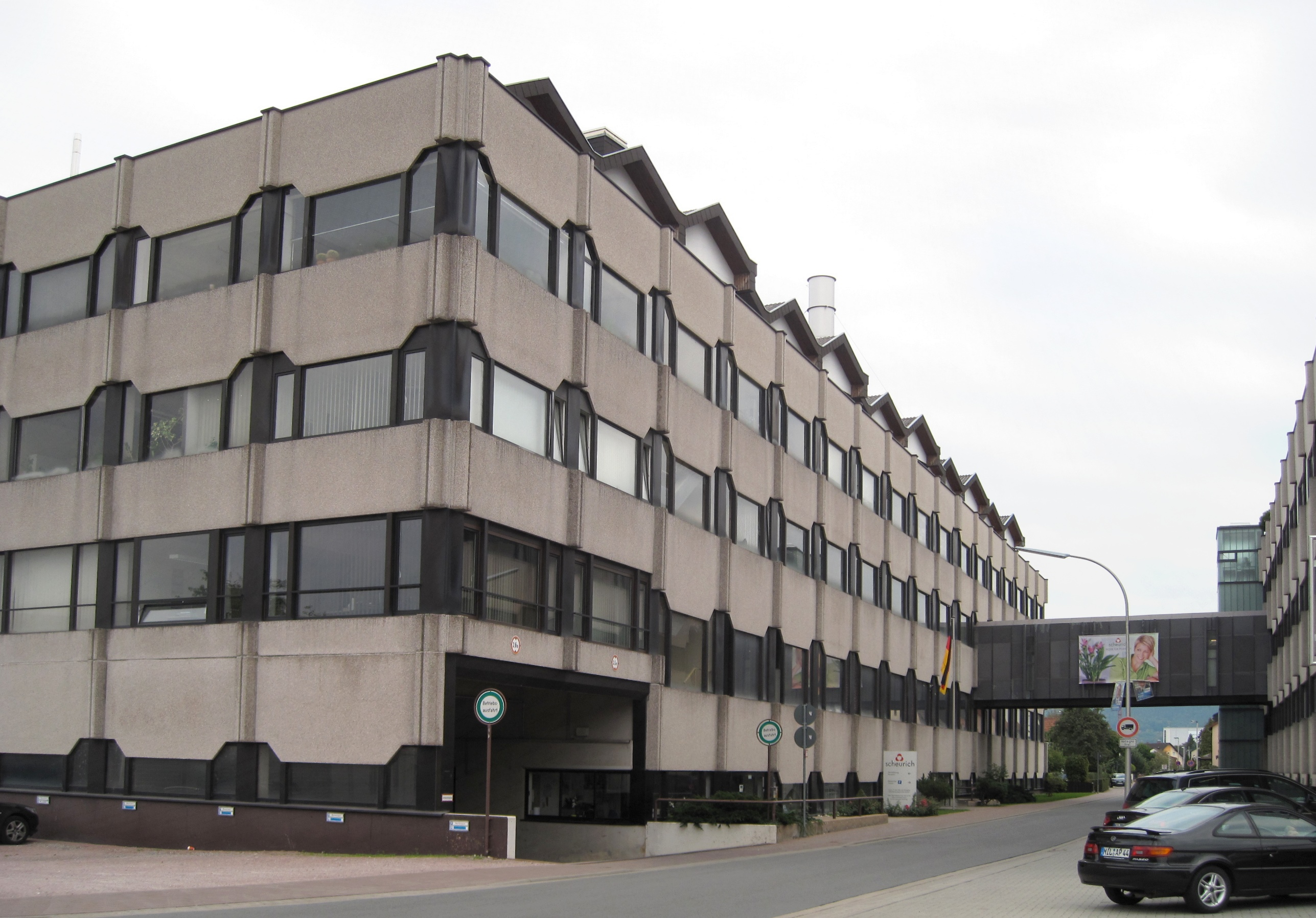 Unternehmen Scheurich (Produzent von Wohnaccessoires aus Keramik) in Kleinheubach. Gebäudeteil an der Gottlieb-Wagner-Straße.